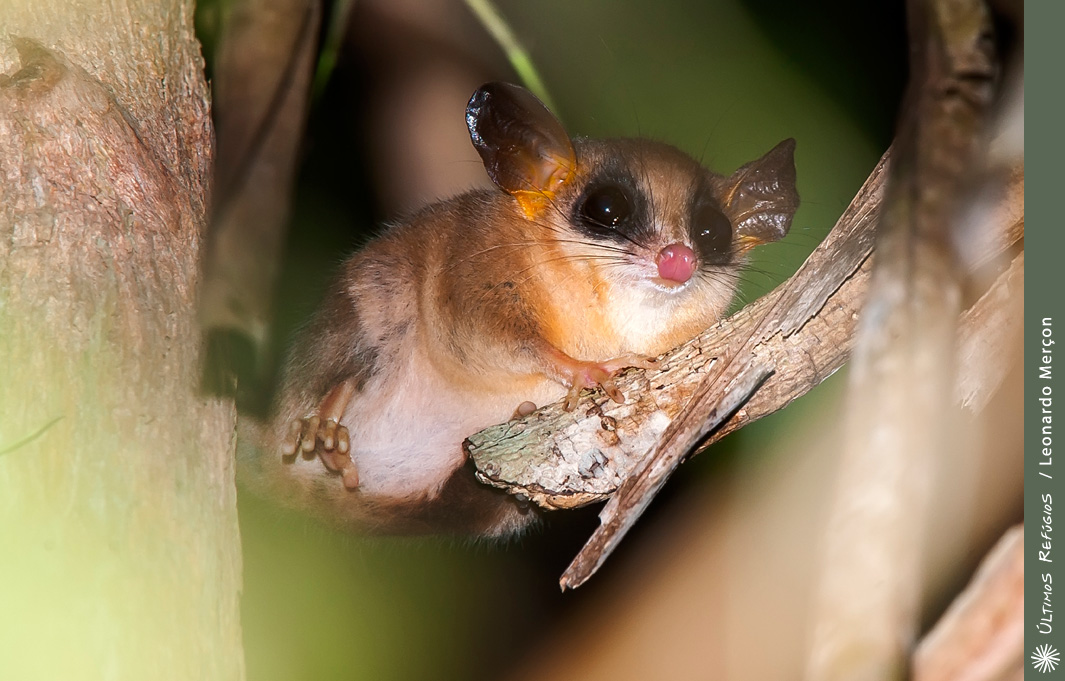 Cuíca (Gracilinanus microtarsus) encontrada em cima de árvore, utilizando uma câmera térmica para localizar animais. Local: Sooretama, Espírito Santo - Brasil Data: 28/08/2014 - ás 20:58h